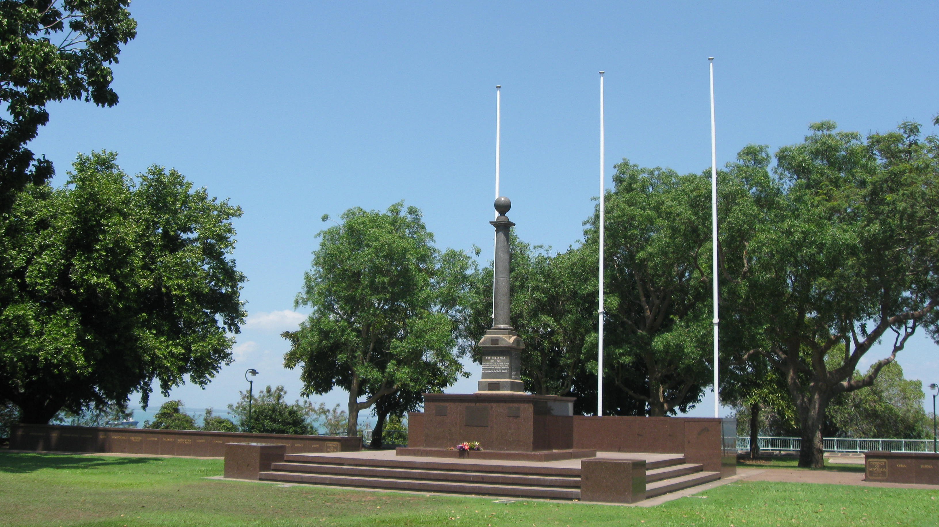 Darwin